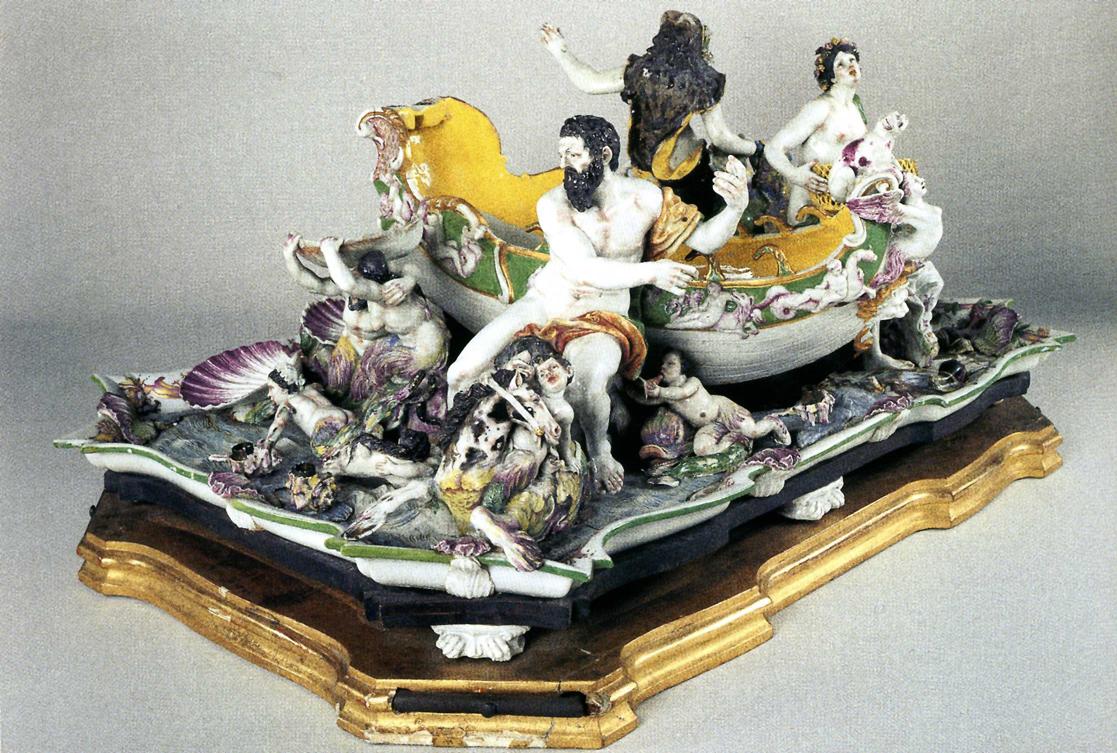 Trionfo della terra e del mare. Ginori a Doccia metà del XVIII secolo.